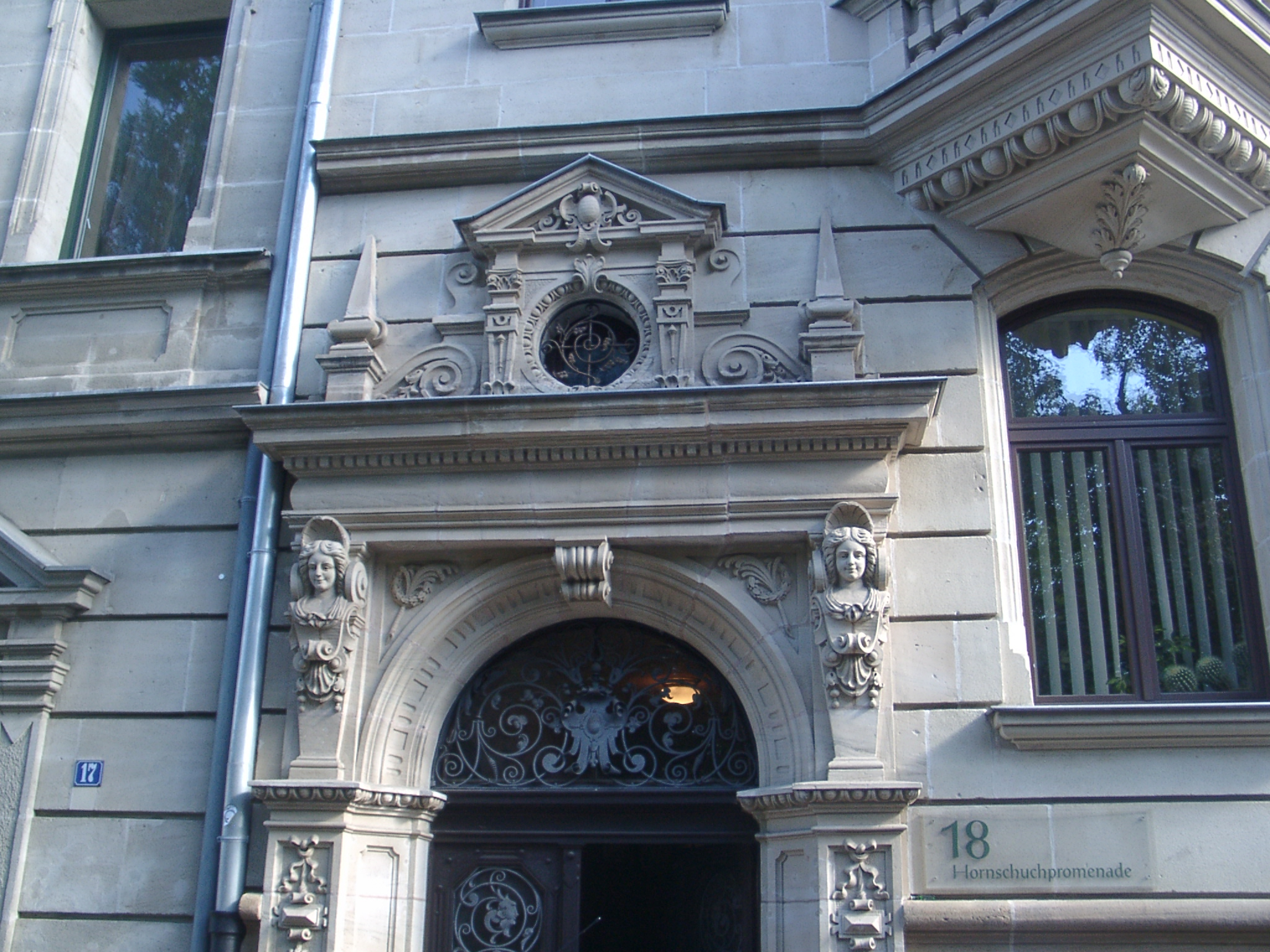 Fürth. Eingang Hornschuchpromenade 18.